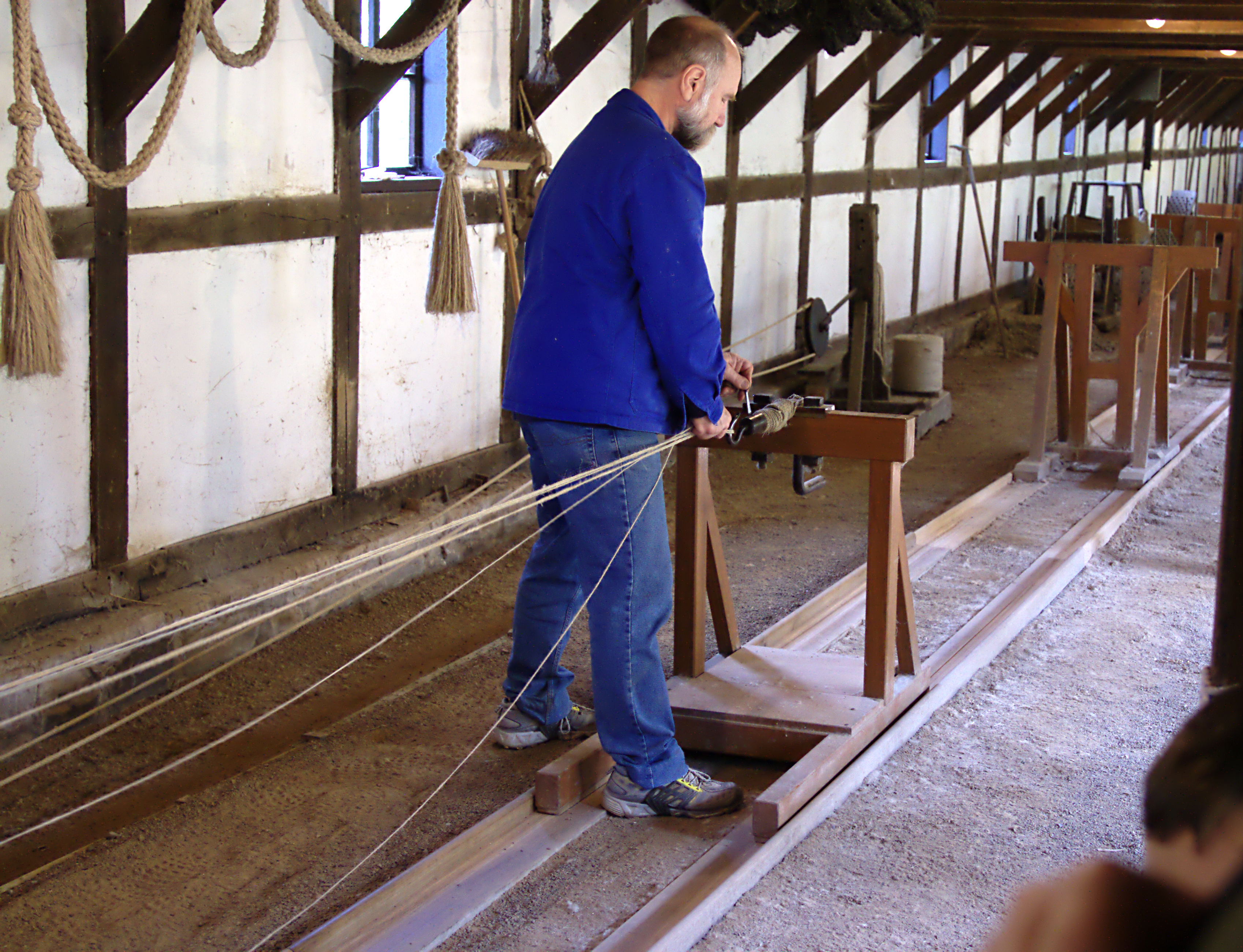 Westfälisches Freilichtmuseum Hagen, Seilerei